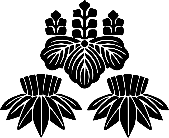 山名氏の正紋